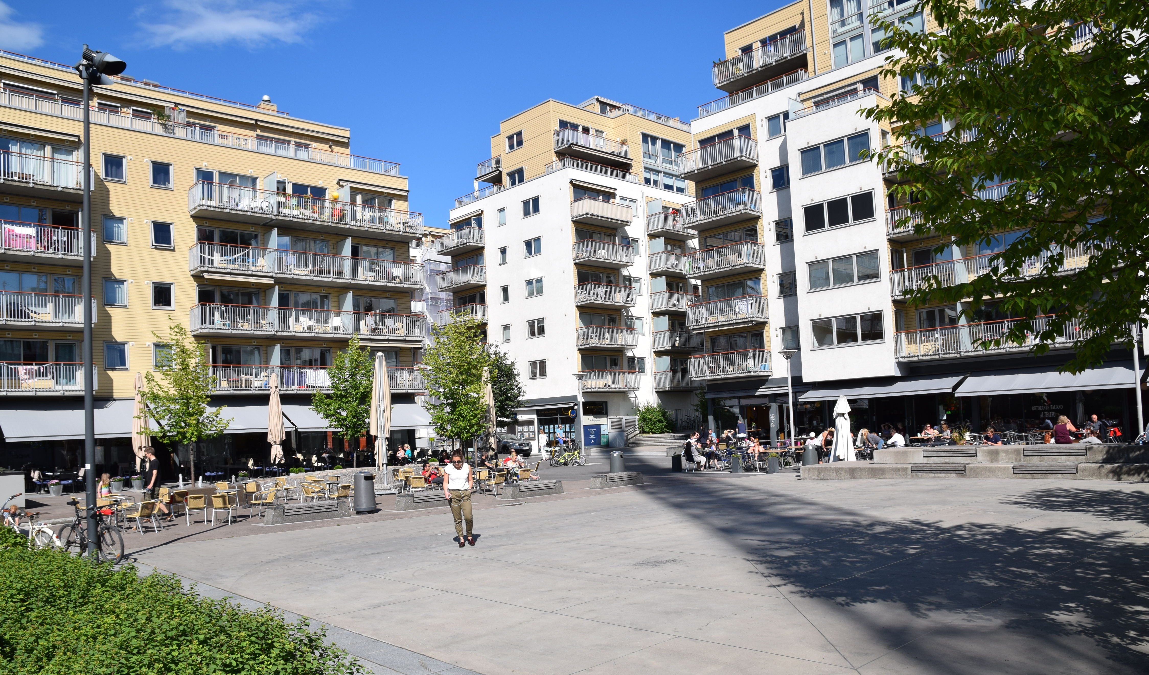 Teaterplassen, Grønland, Oslo seen from Joachim Nielsens gang